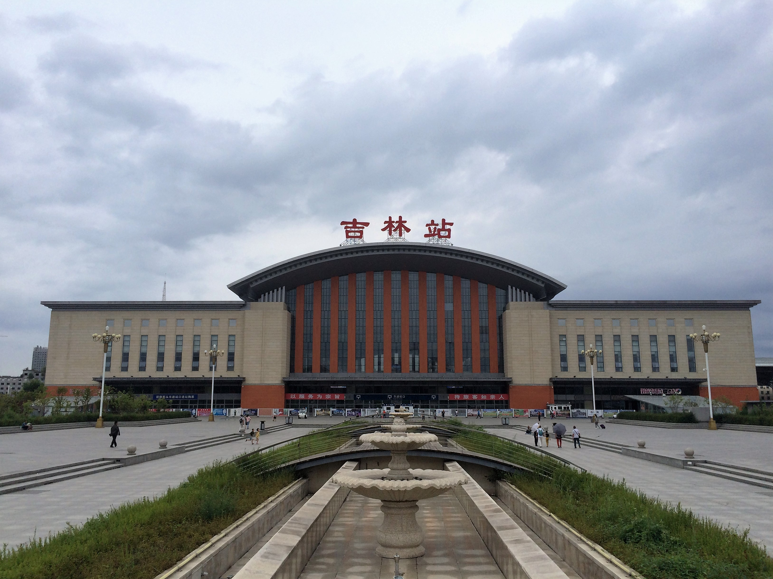 中文（中国大陆）: 吉林站东站房